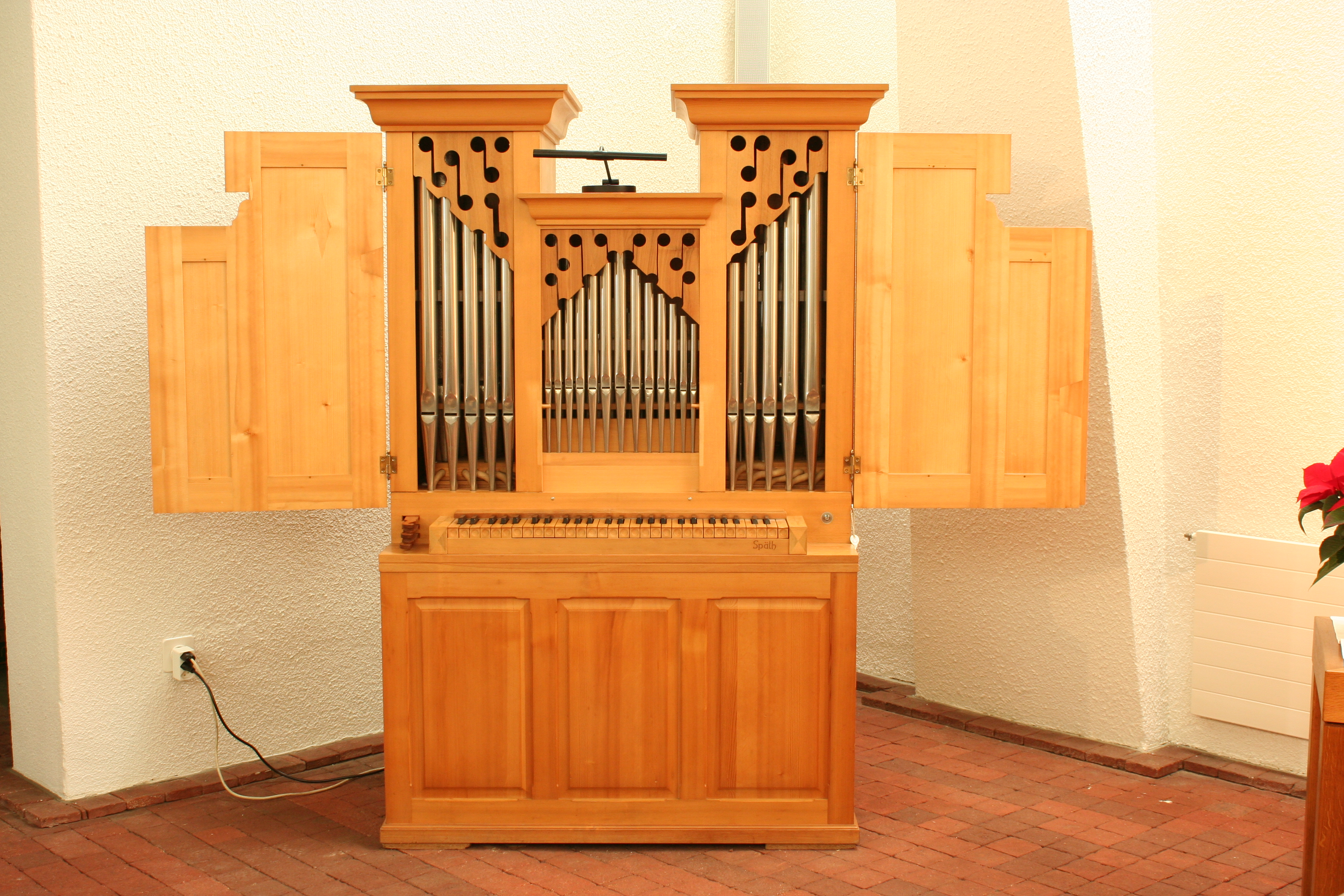 Römisch-katholische Pfarrkirche St. Ulrich Winterthur-Rosenberg, Späth-Orgel in der Marienkapelle